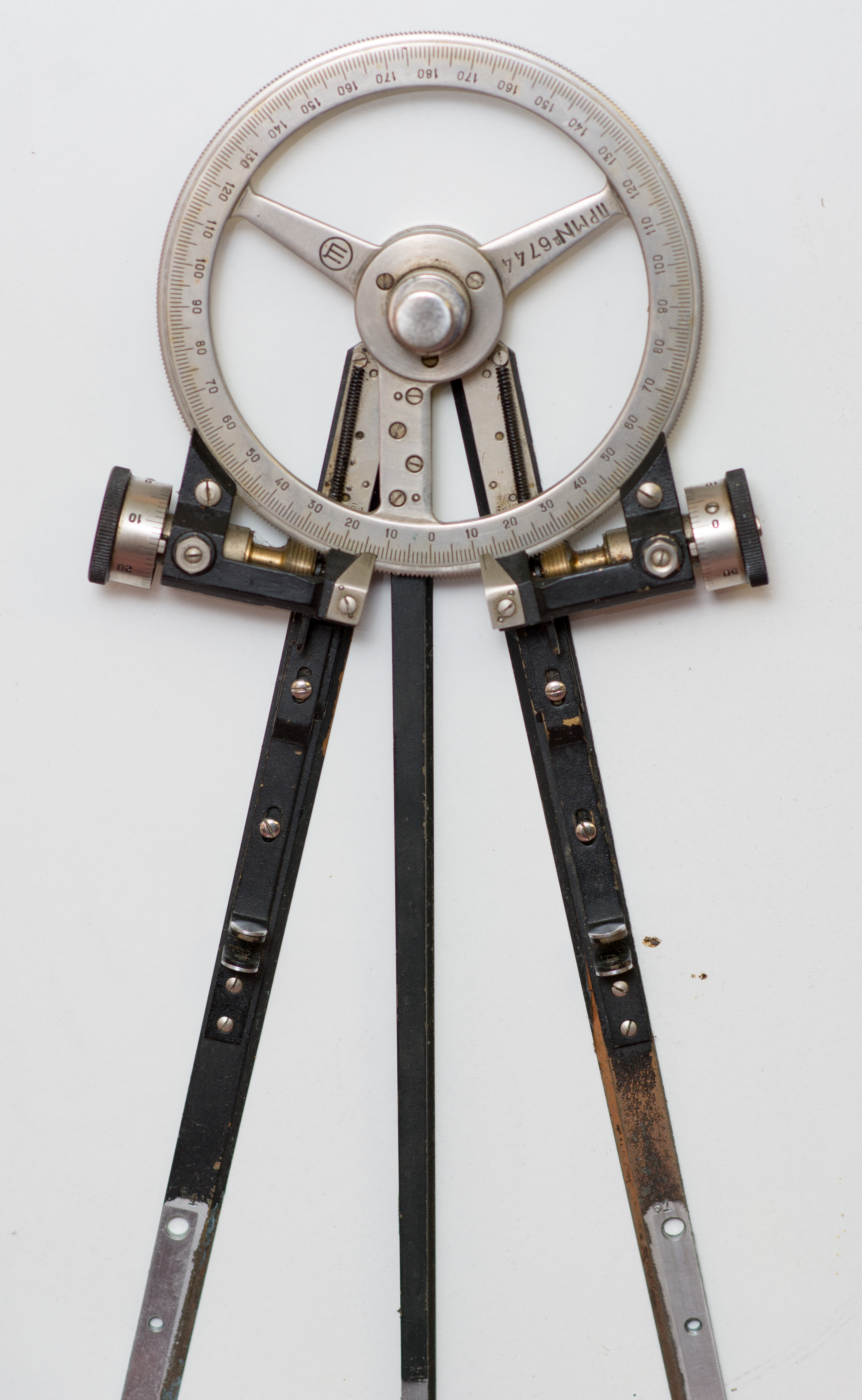 Судовой навигационный прибор.